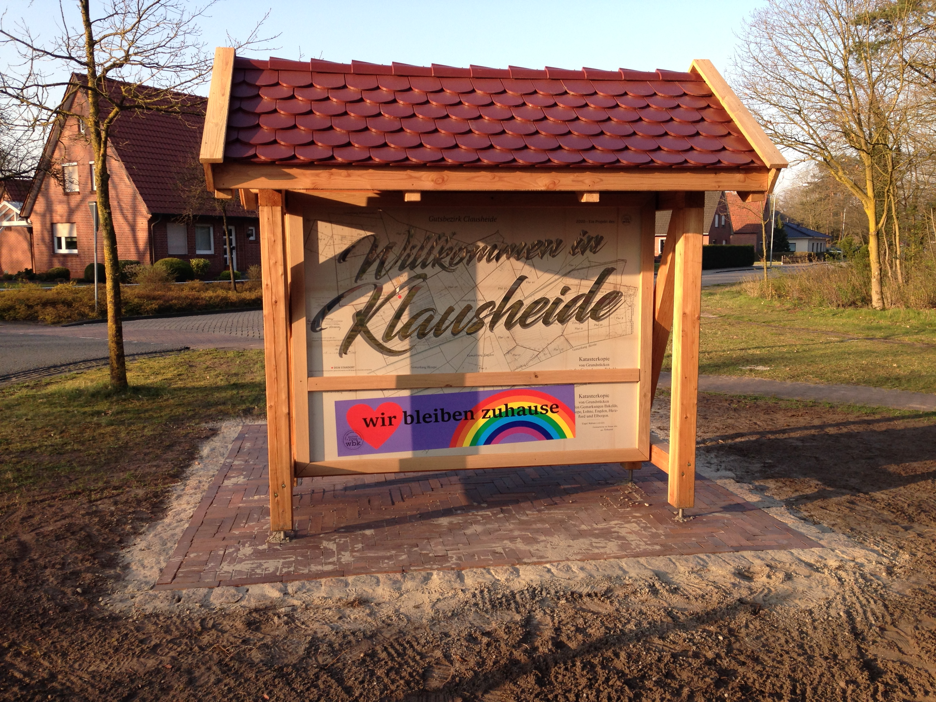 Ortseingangsschild an der Ecke Klausheider Weg/Flugplatzstraße in Klausheide.